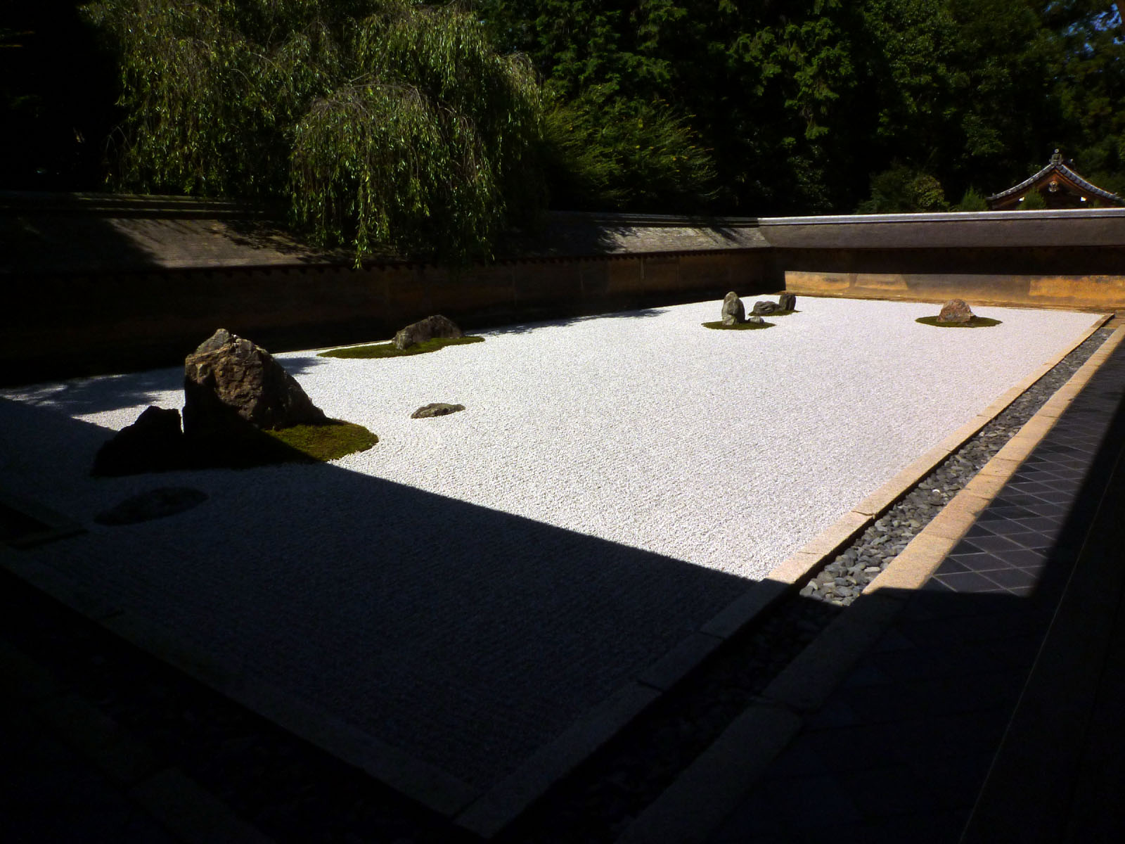 Rock garden at Ryoan-ji in Kyoto